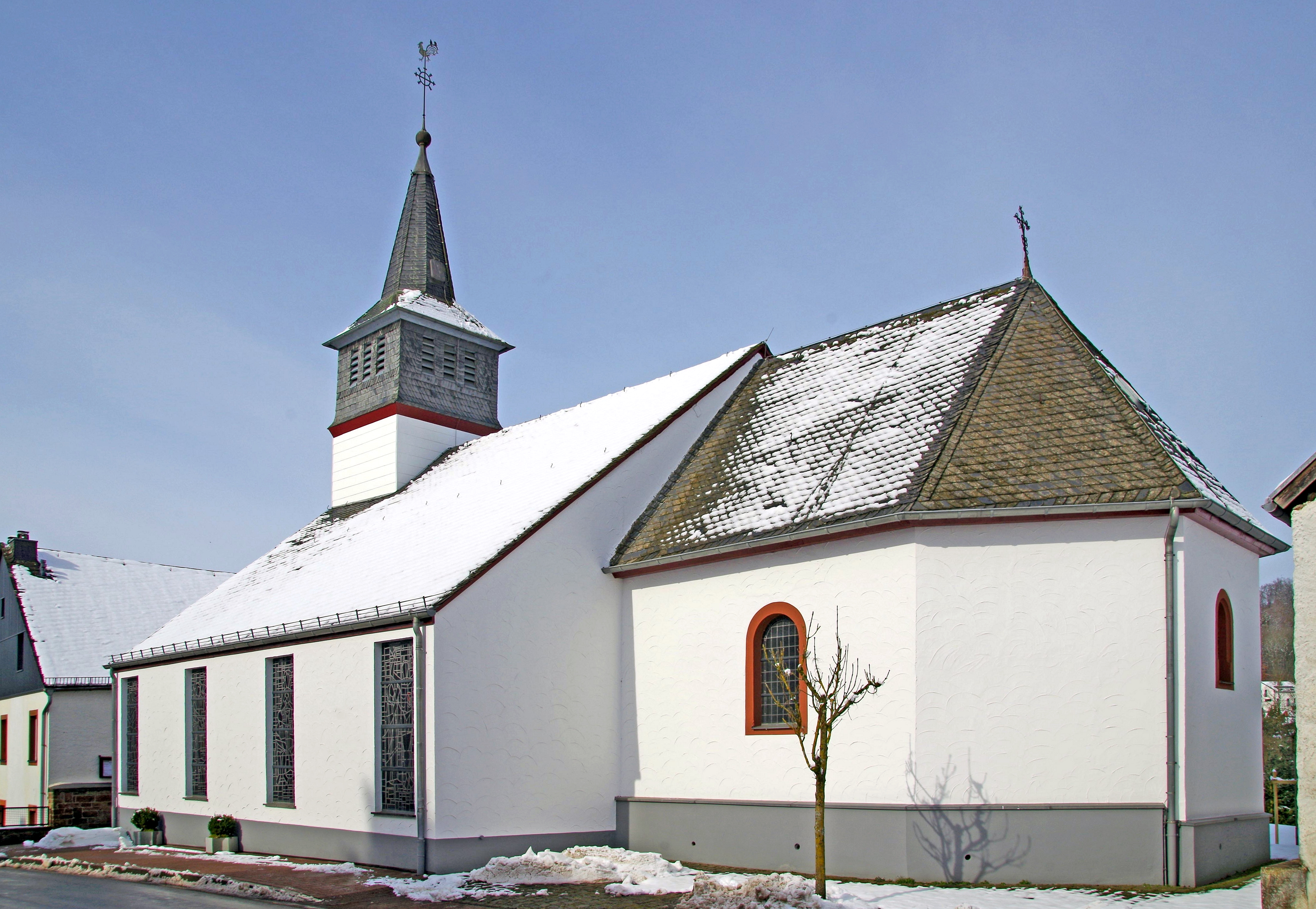 St. Nikolaus (Oberbettingen), Südostansicht